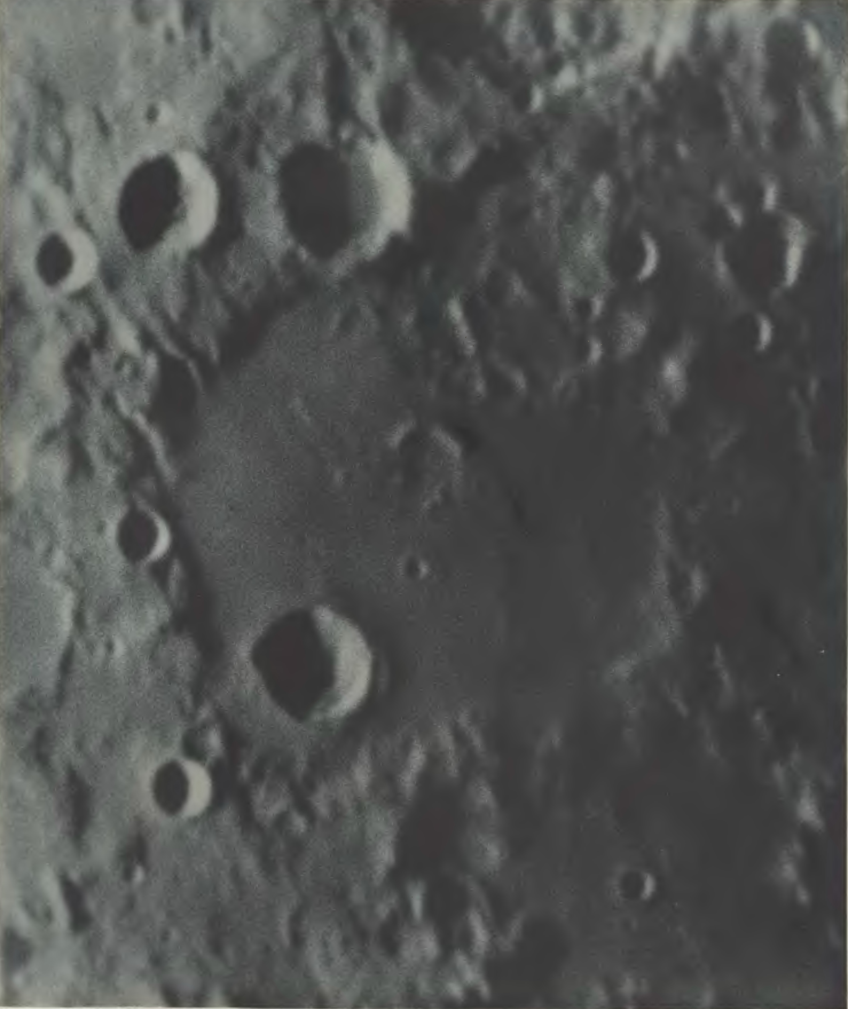 Photographischer Mond-Atlas vornehmlich auf Grund von focalen Negativen der Lick-Sternwarte im Massstabe eines Monddurchmessers von 10 Fuss ausgeführt von Professor Ladislaus Weinek. Heft II. Tafel 33